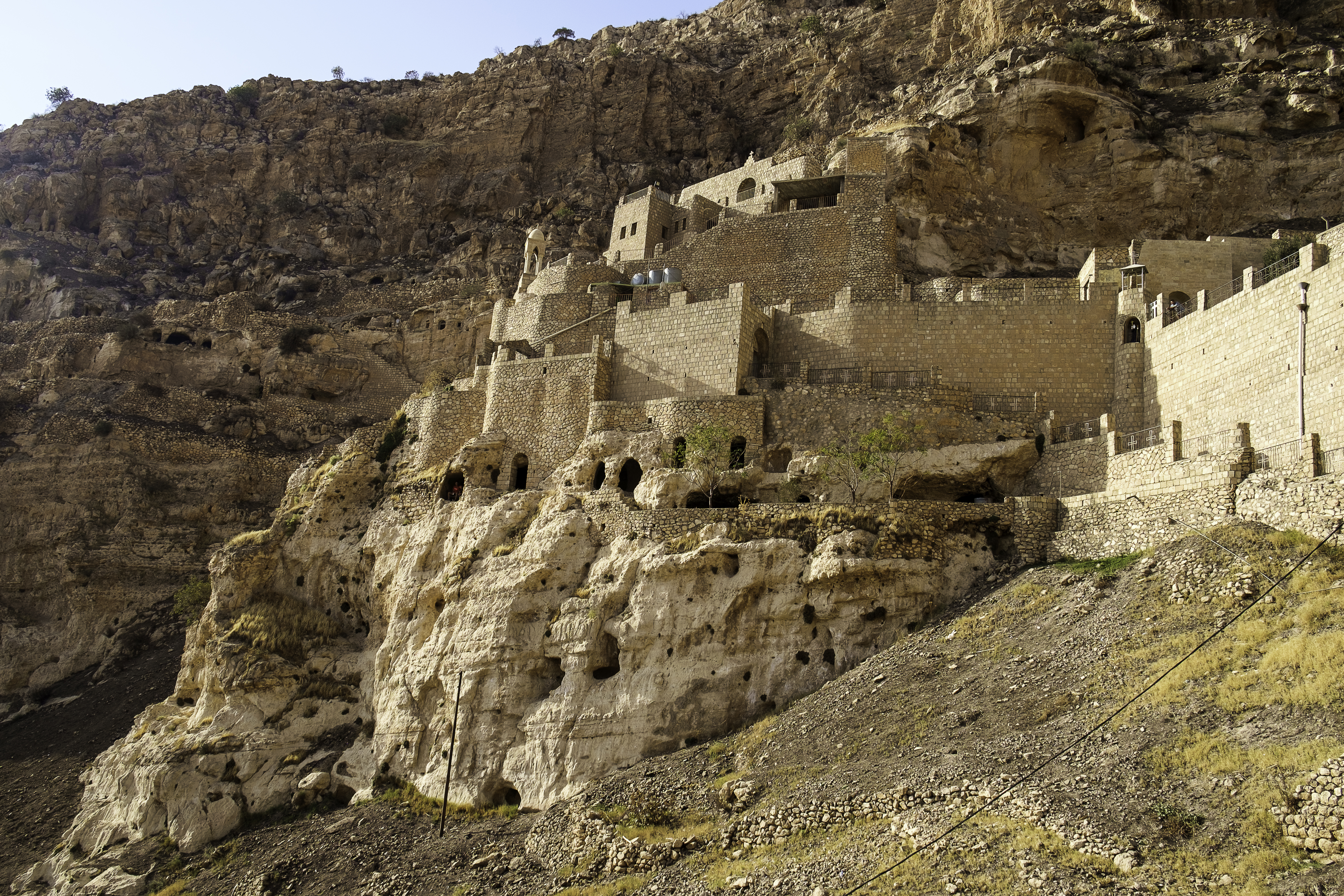 Rabban Hormizd Monastery